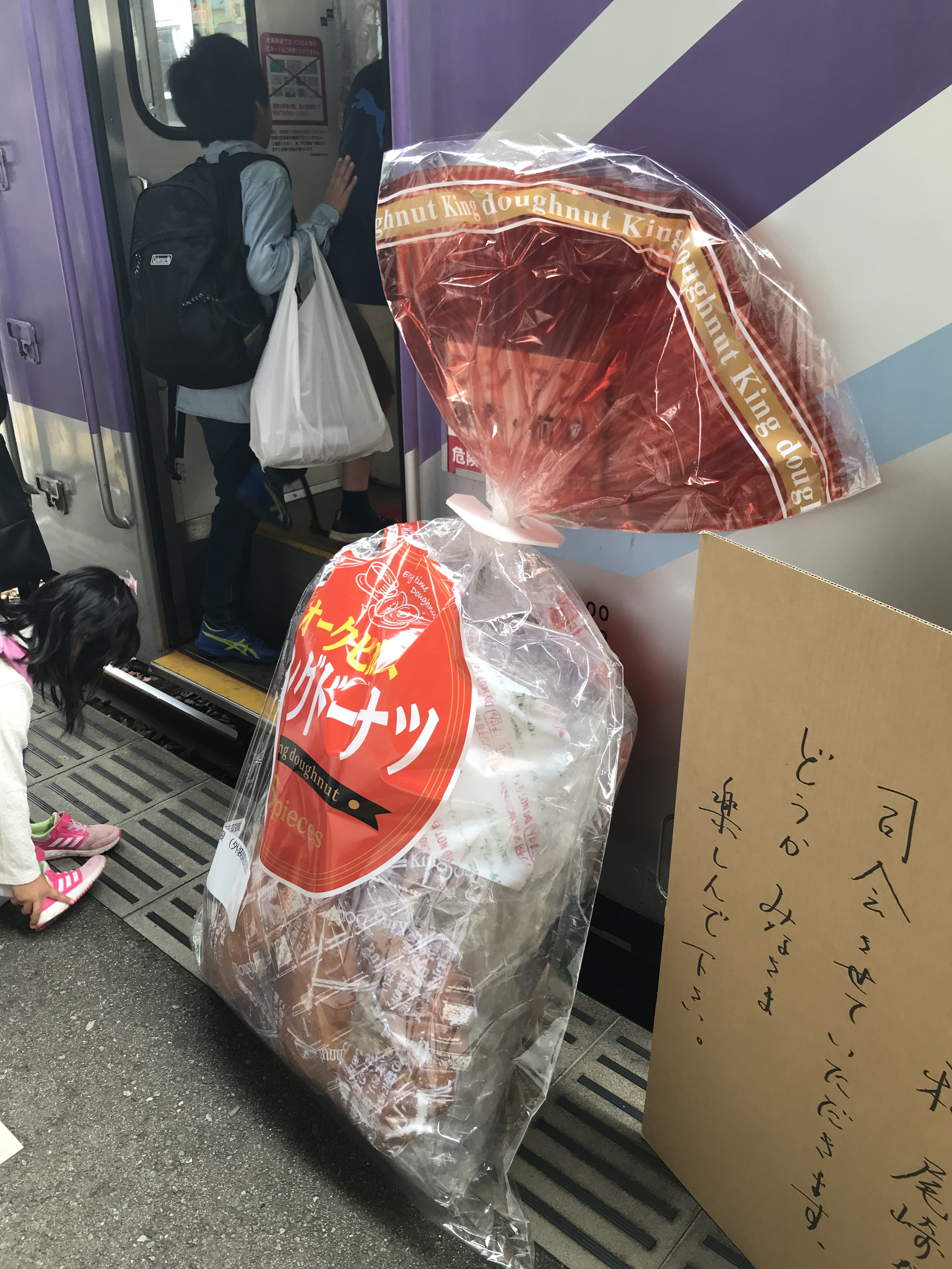 加西市の丸中製菓です。